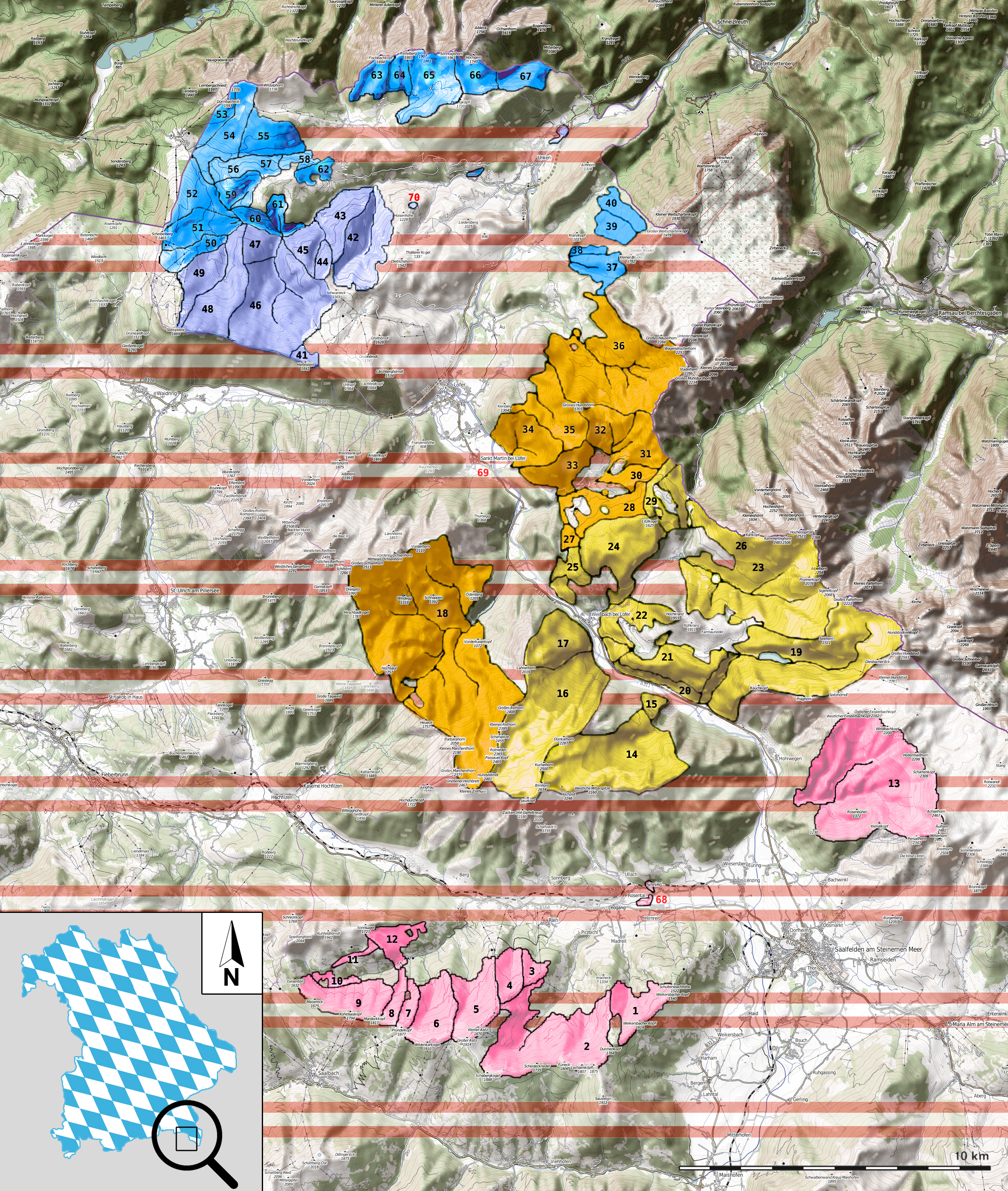 Lage der Reviere im Forstbetrieb St. Martin (Bayerische Saalforste in Österreich) Bayerisches Staatsgebiet Österreichisches Staatsgebiet